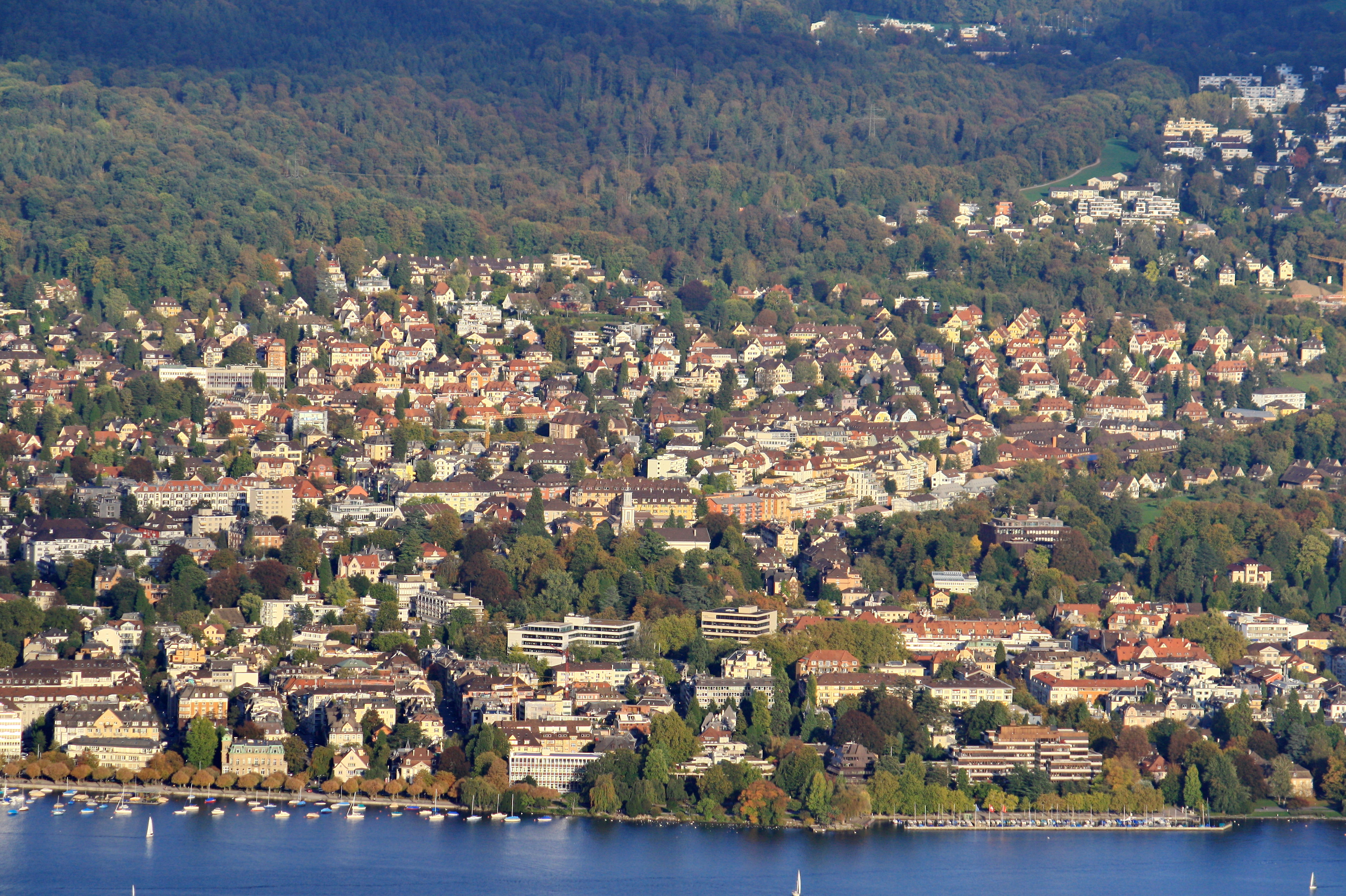 Adlisberg and Zürich-Hirslanden, as seen from Uetliberg Aussichtsturm, Seefeld quarter in the foreground.